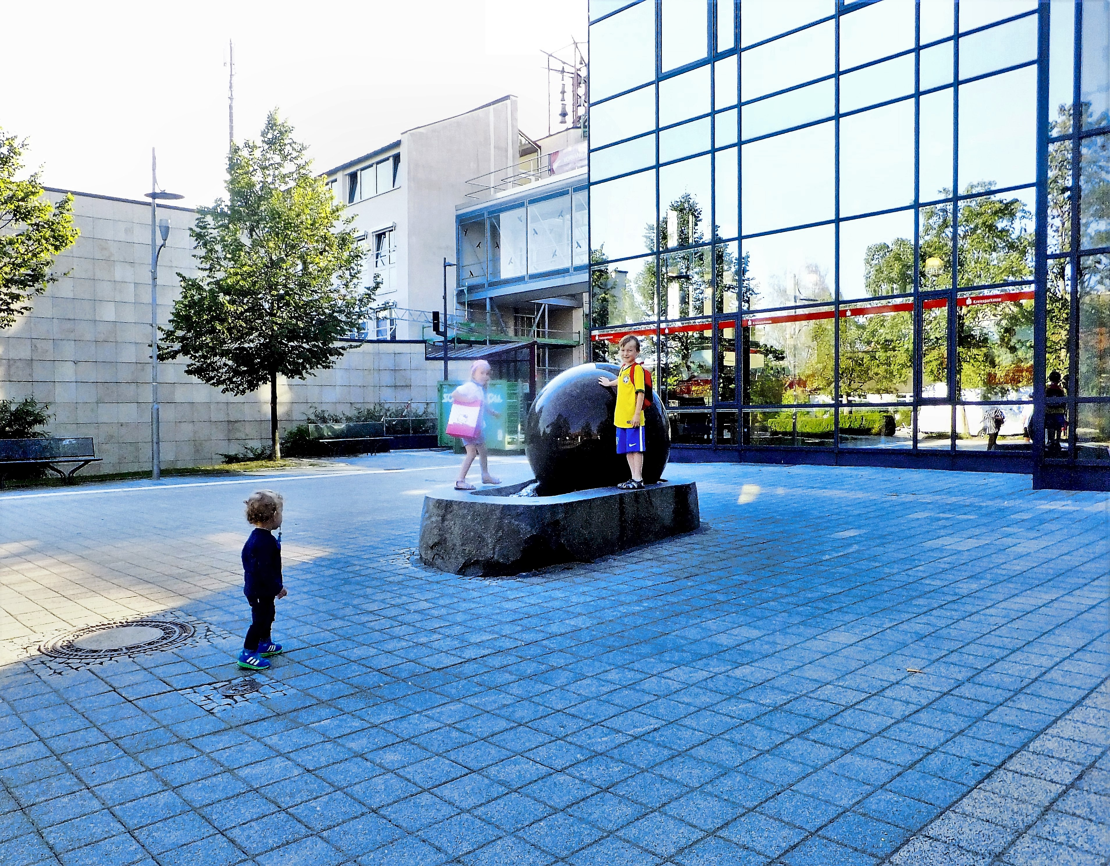 Stadtverwaltungskomplex Unterschleißheim, links alt, rechts neu